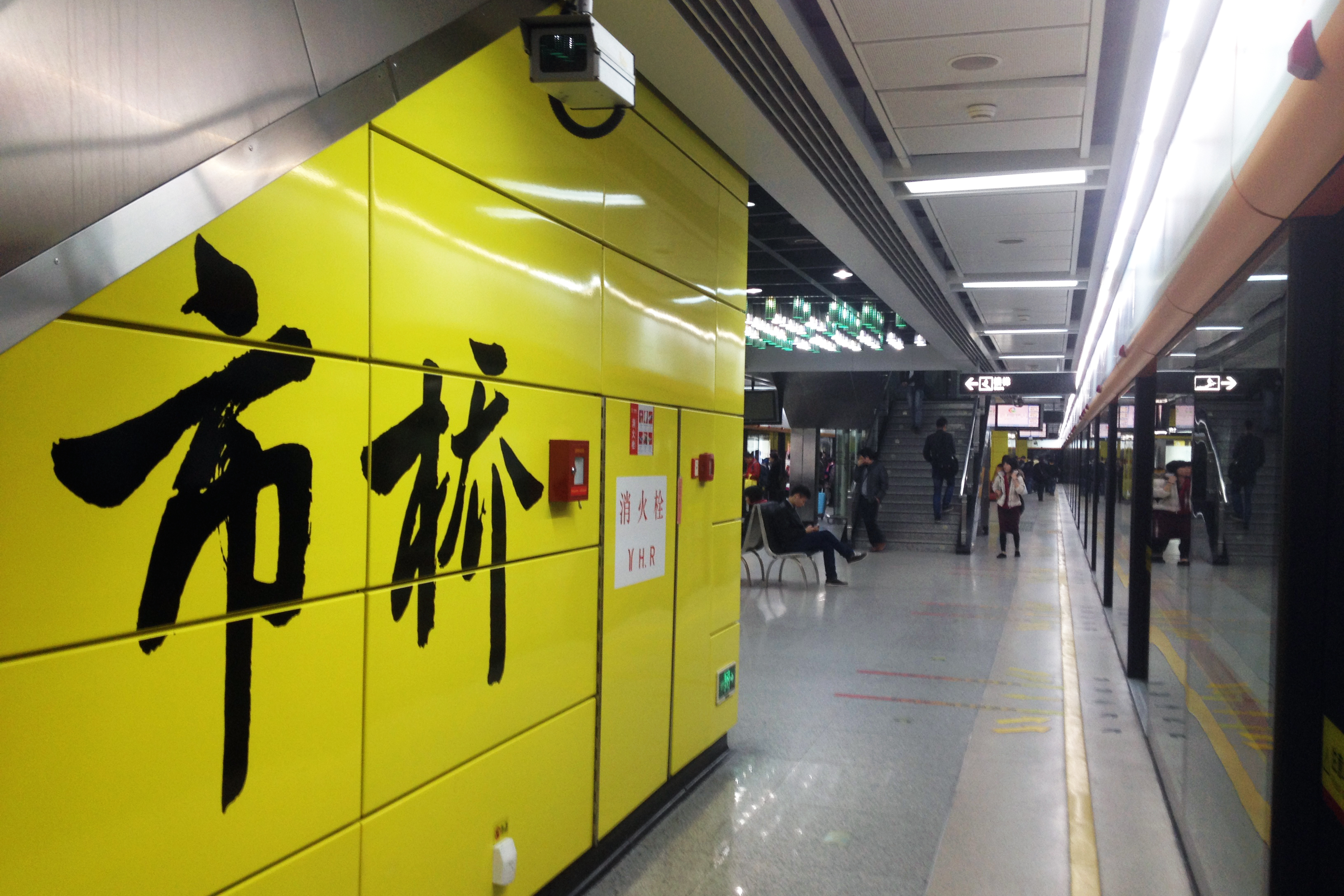 广州地铁市桥站月台（番禺广场方向）